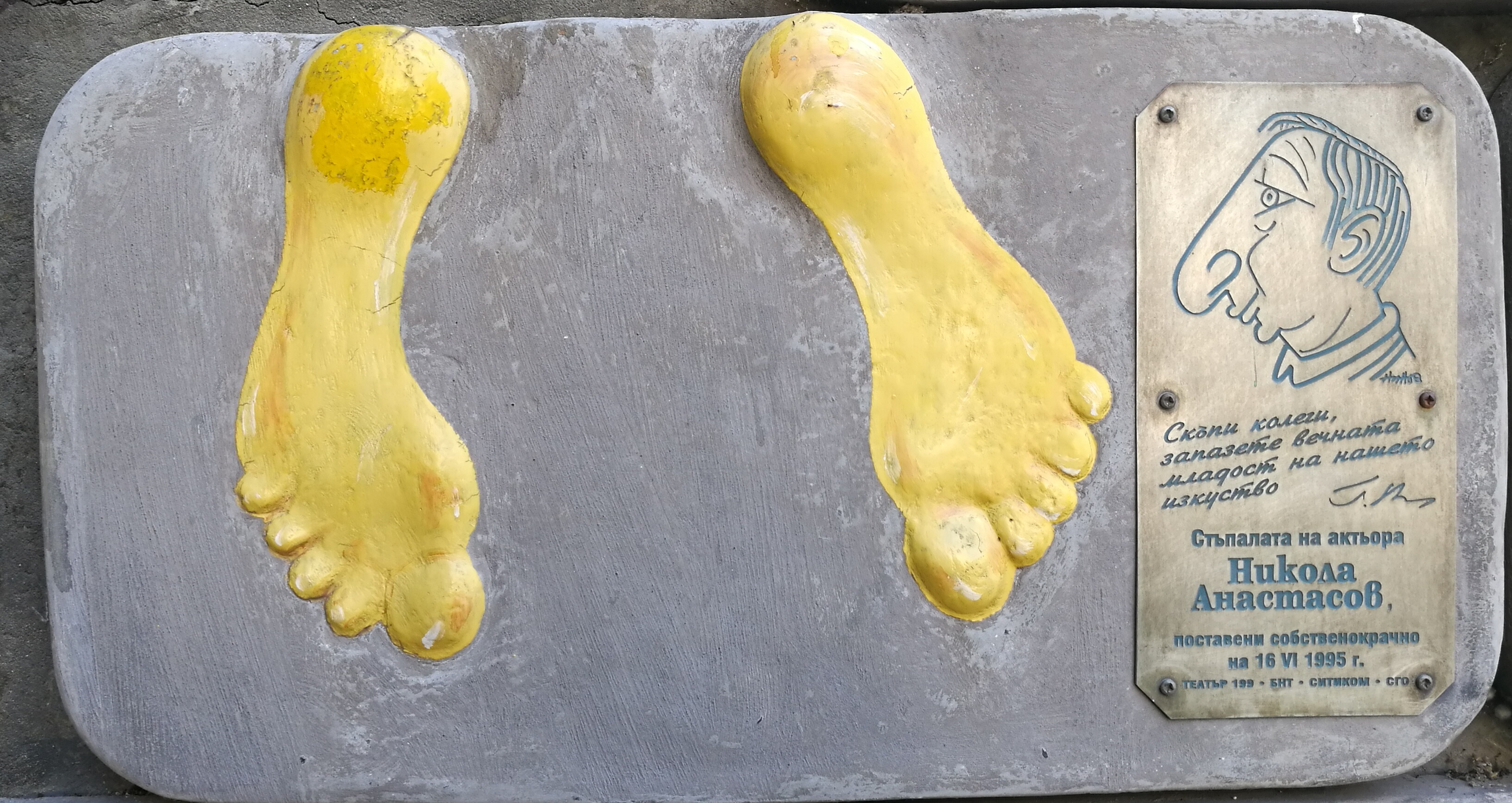 Стената на славата пред Театър 199 - пано с отпечатъци, послание и шарж на Никола Анастасов.